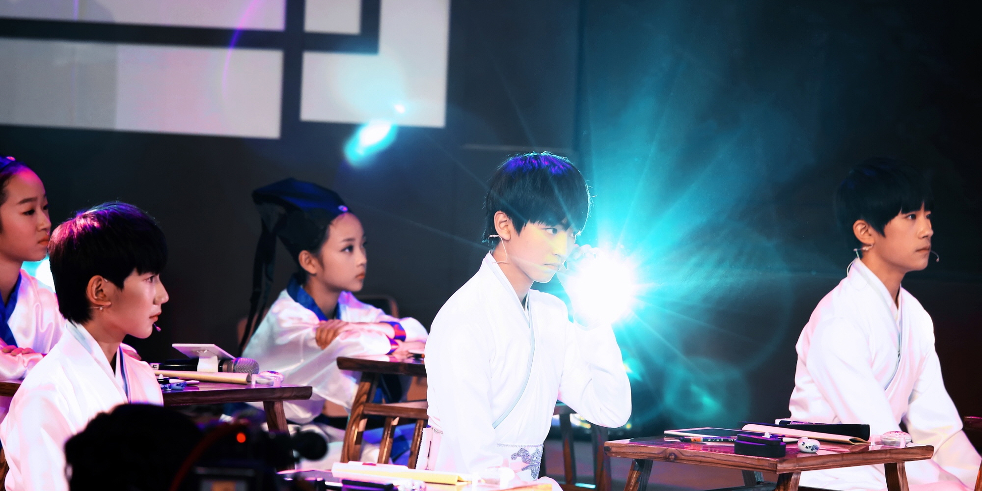 我的生命在等一束光，直到你出现在舞台上